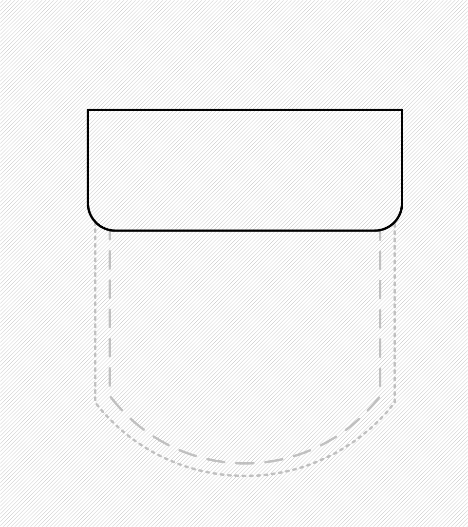 Diagram of flap pocket.